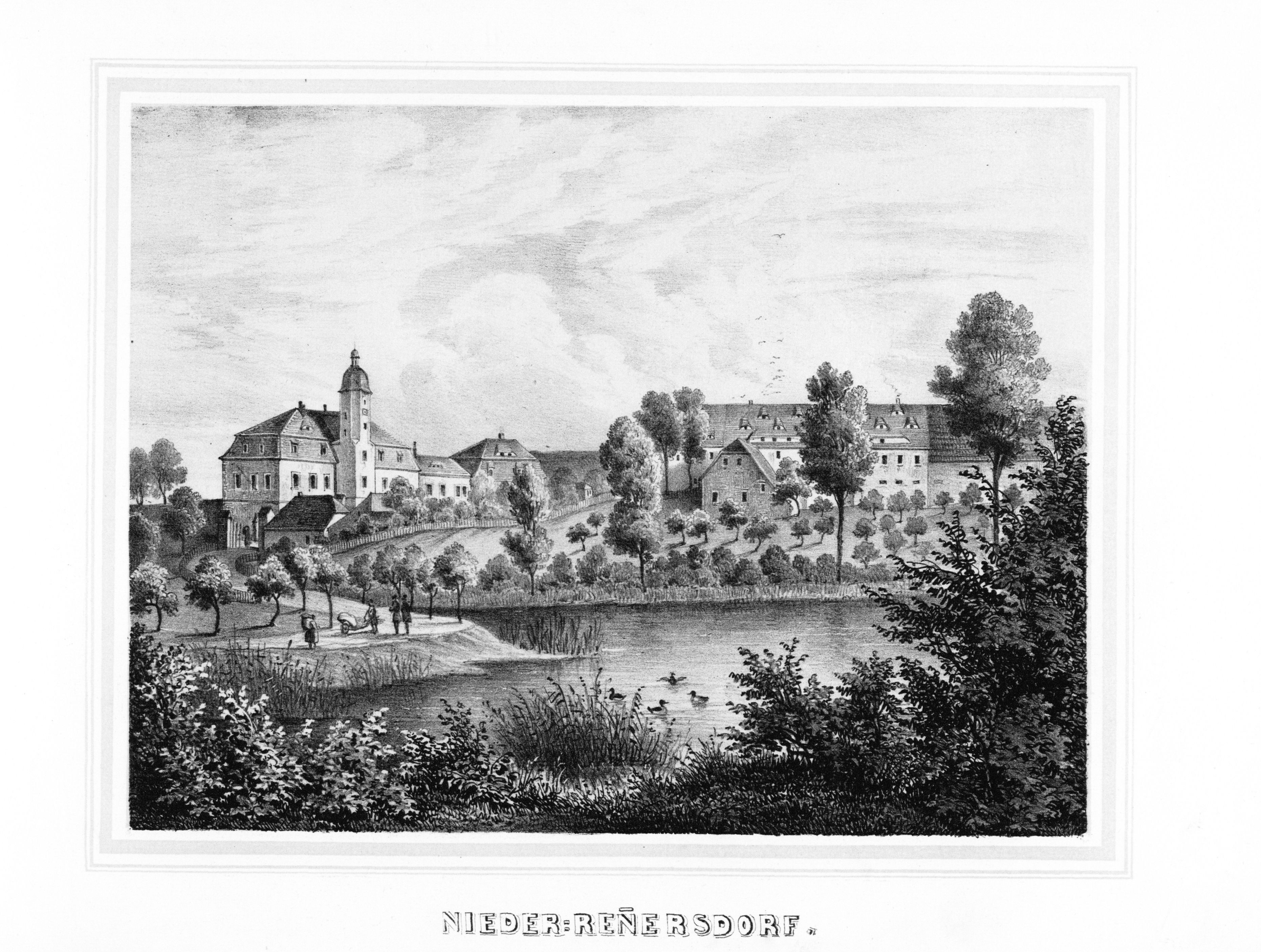 Nieder - Rennersdorf aus: Album der Rittergüter und Schlösser im Königreiche Sachsen Markgrafenthum Oberlausitz Section: III